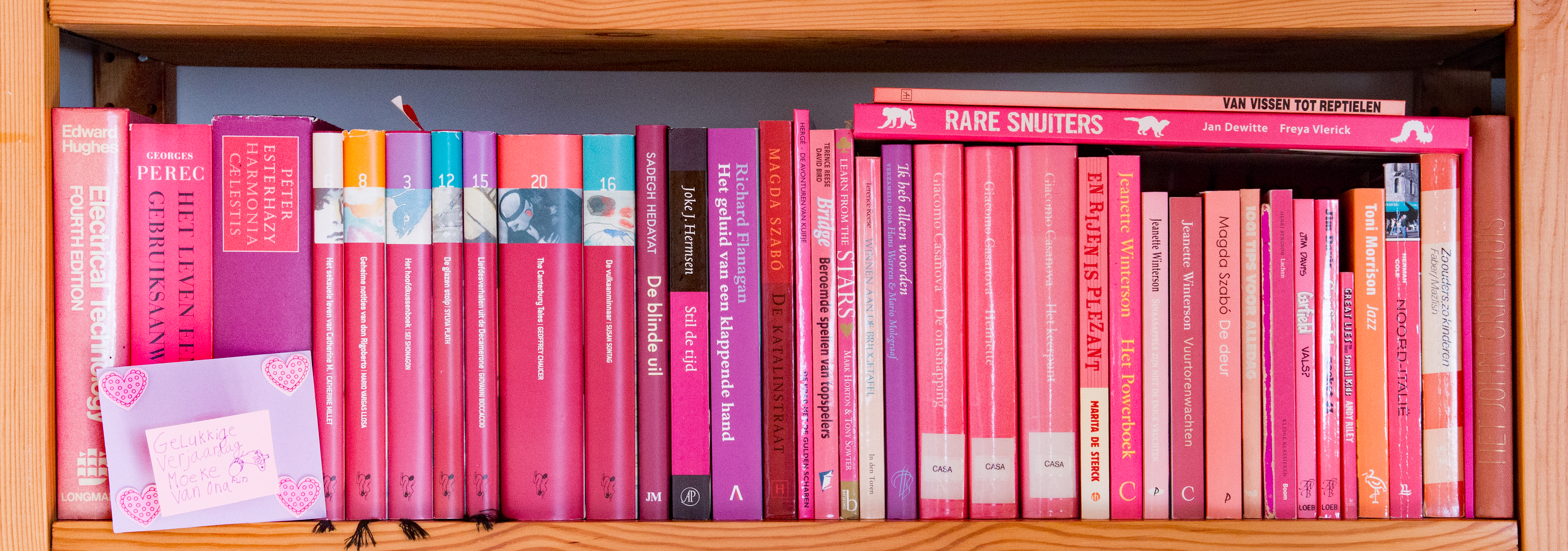 Roze boekenschap